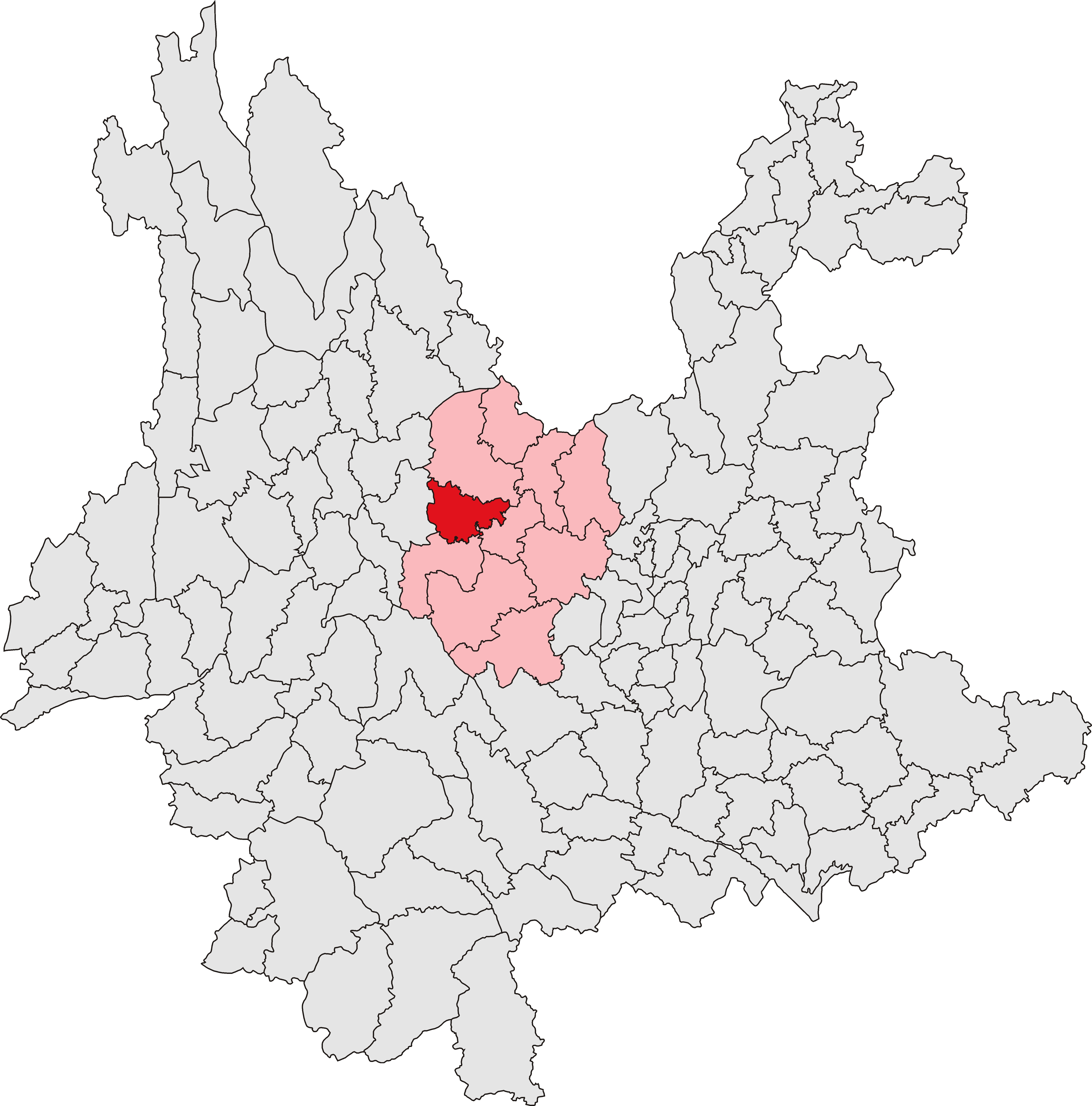 中文（中国大陆）: 姚安县位置图